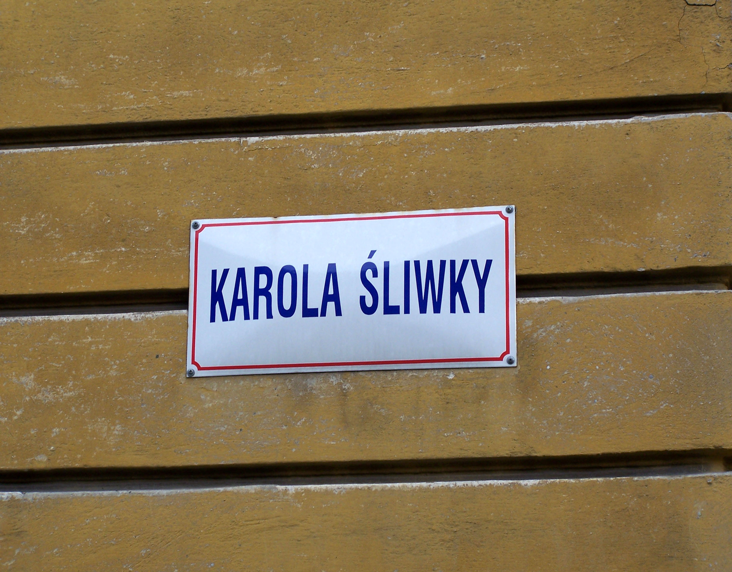 Karol Śliwka Street in Karviná-Fryštát (Karwina-Frysztat), Czech Republic